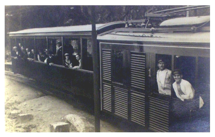 Zahnradlokomotive He 2/2 Nr. 1, gebaut 1909 von der SLM und der Maschinenfabrik Oerlikon für die Corcovadobahn